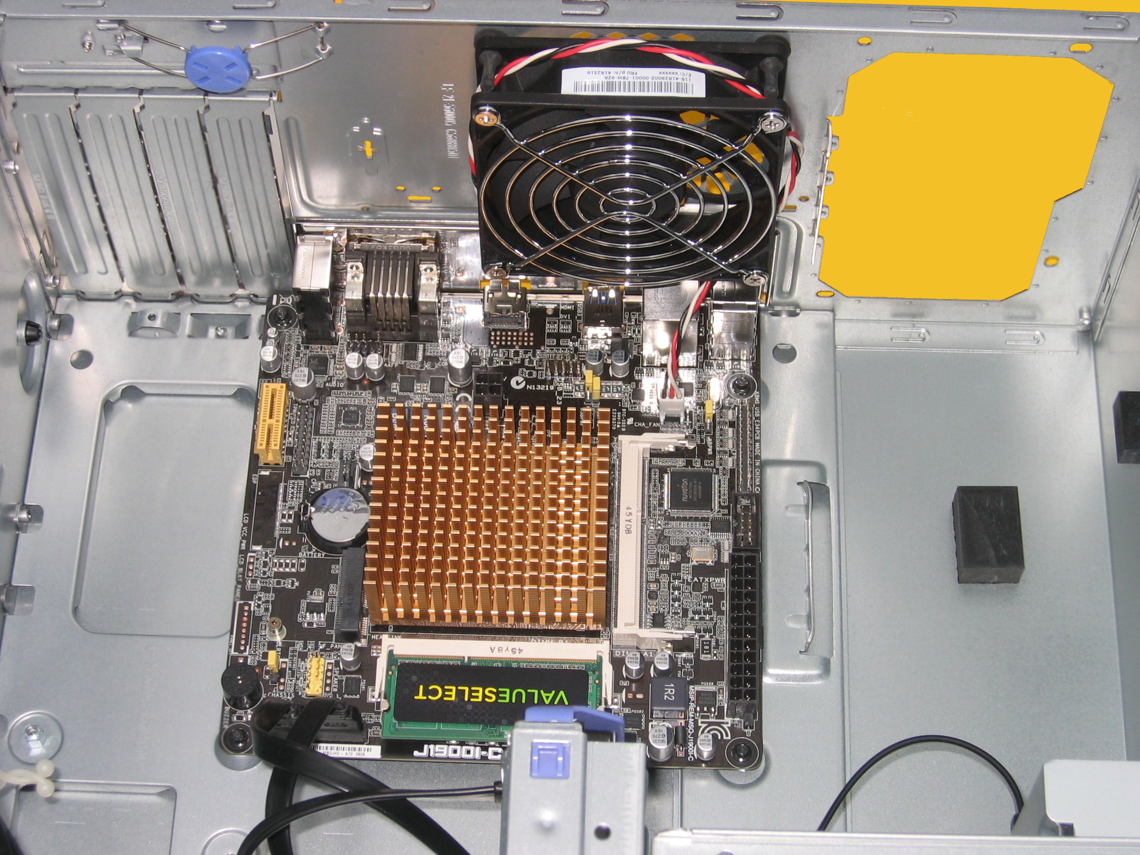 Mini-ITX Hauptplatine im micro-ATX-Gehäuse